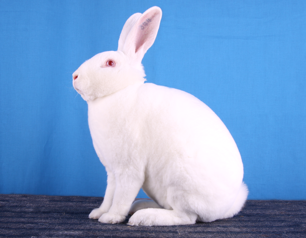 Rex, vit rödögd. Foto: Sanna Snaula Storm